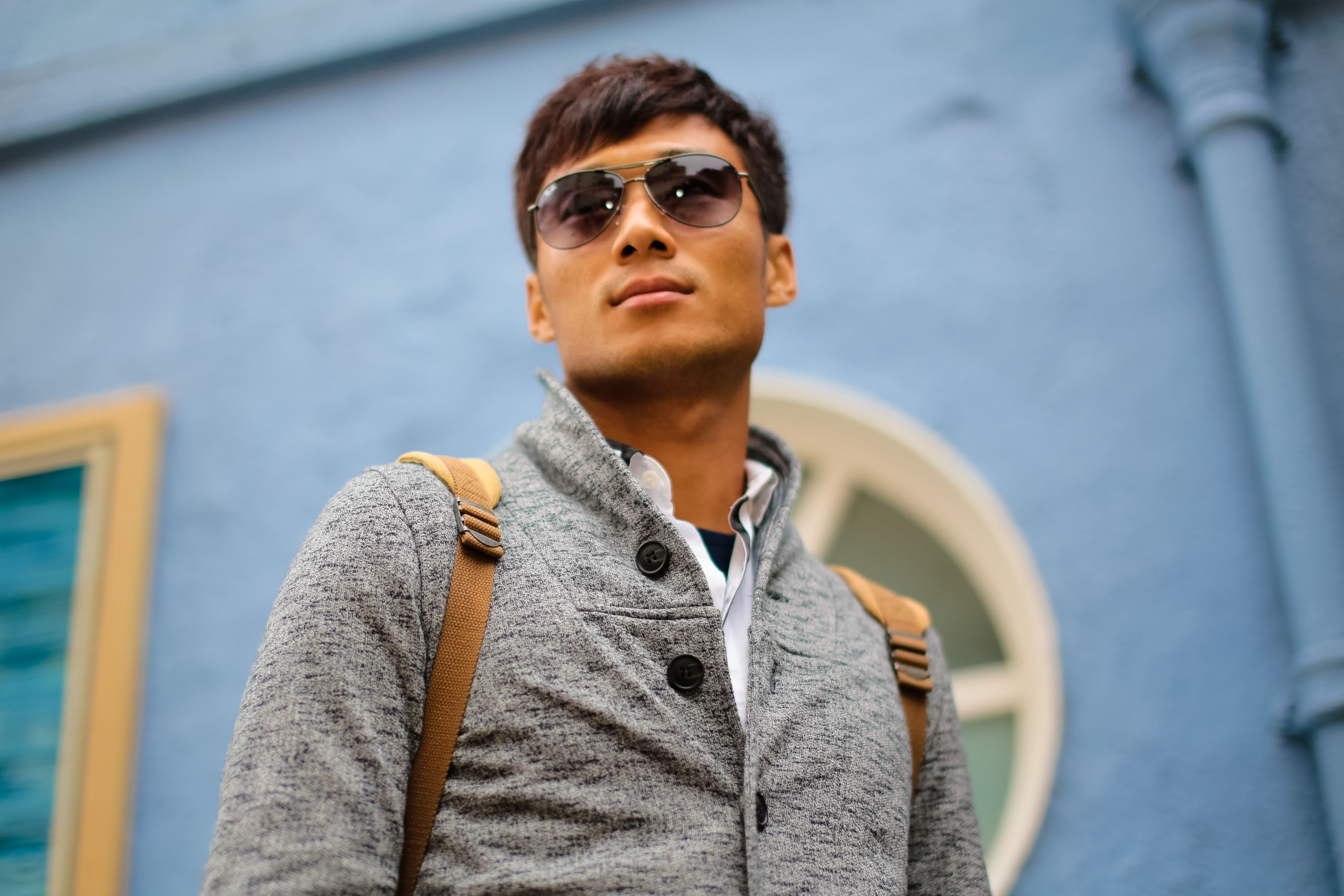 一輯球迷為元洋拍的街拍照帶動了足球員拍攝時尚便衣造型照的風氣